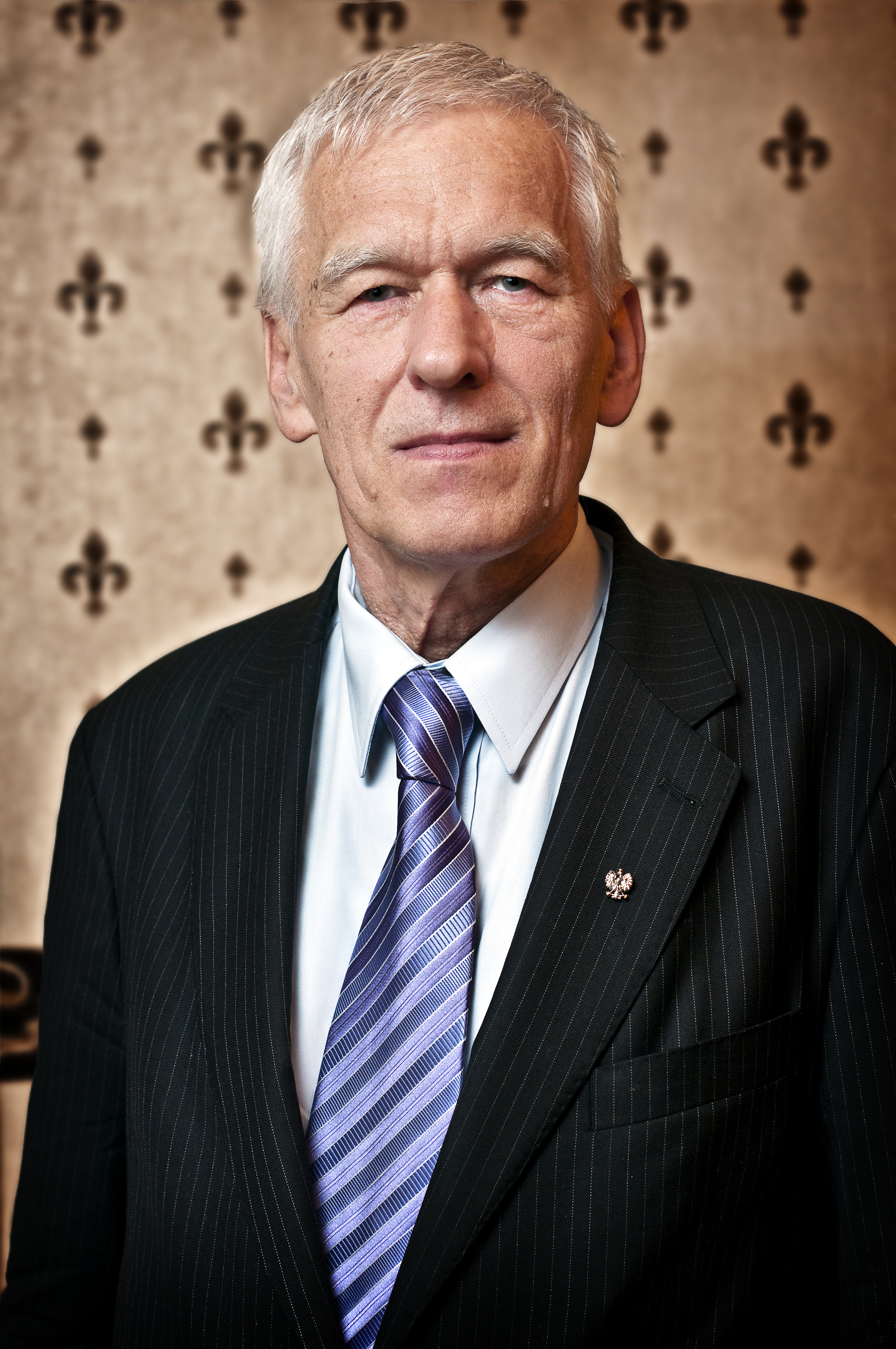 Kornel Morawiecki - zdjęcie portretowe